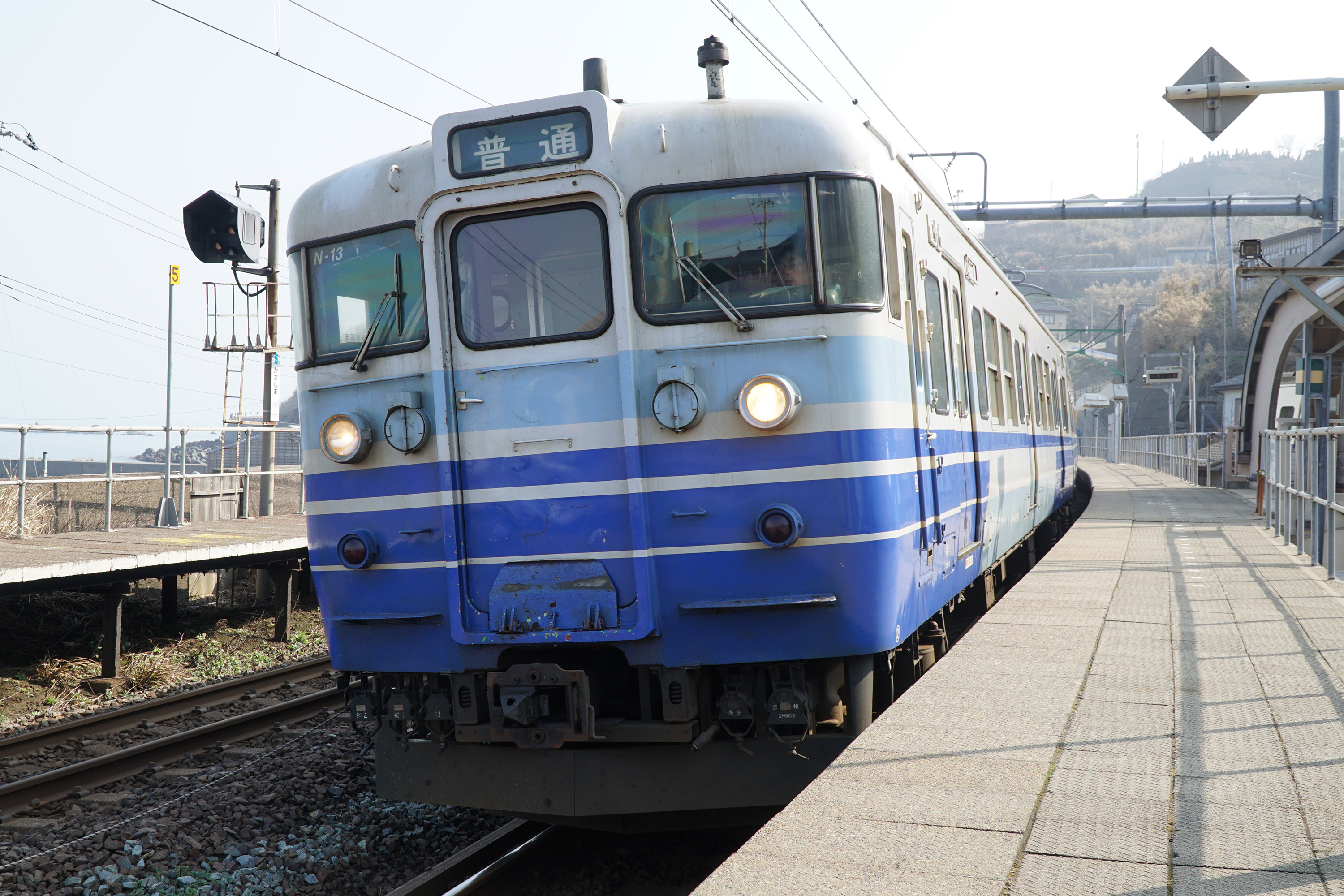 笠島駅 直江津方面ホーム